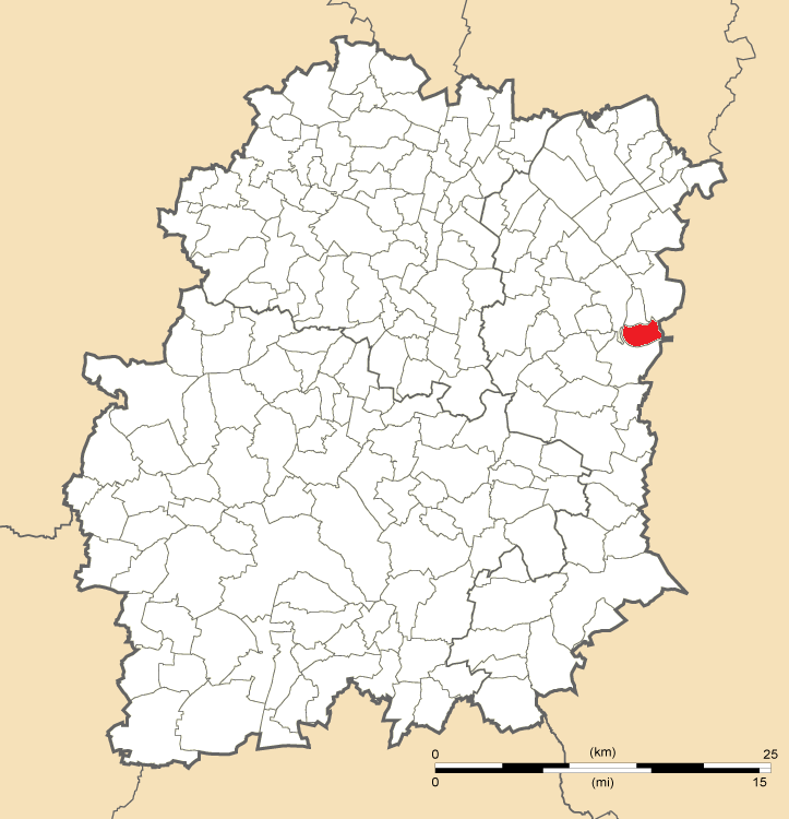 Carte de position de Morsang-sur-Seine en Essonne (91)